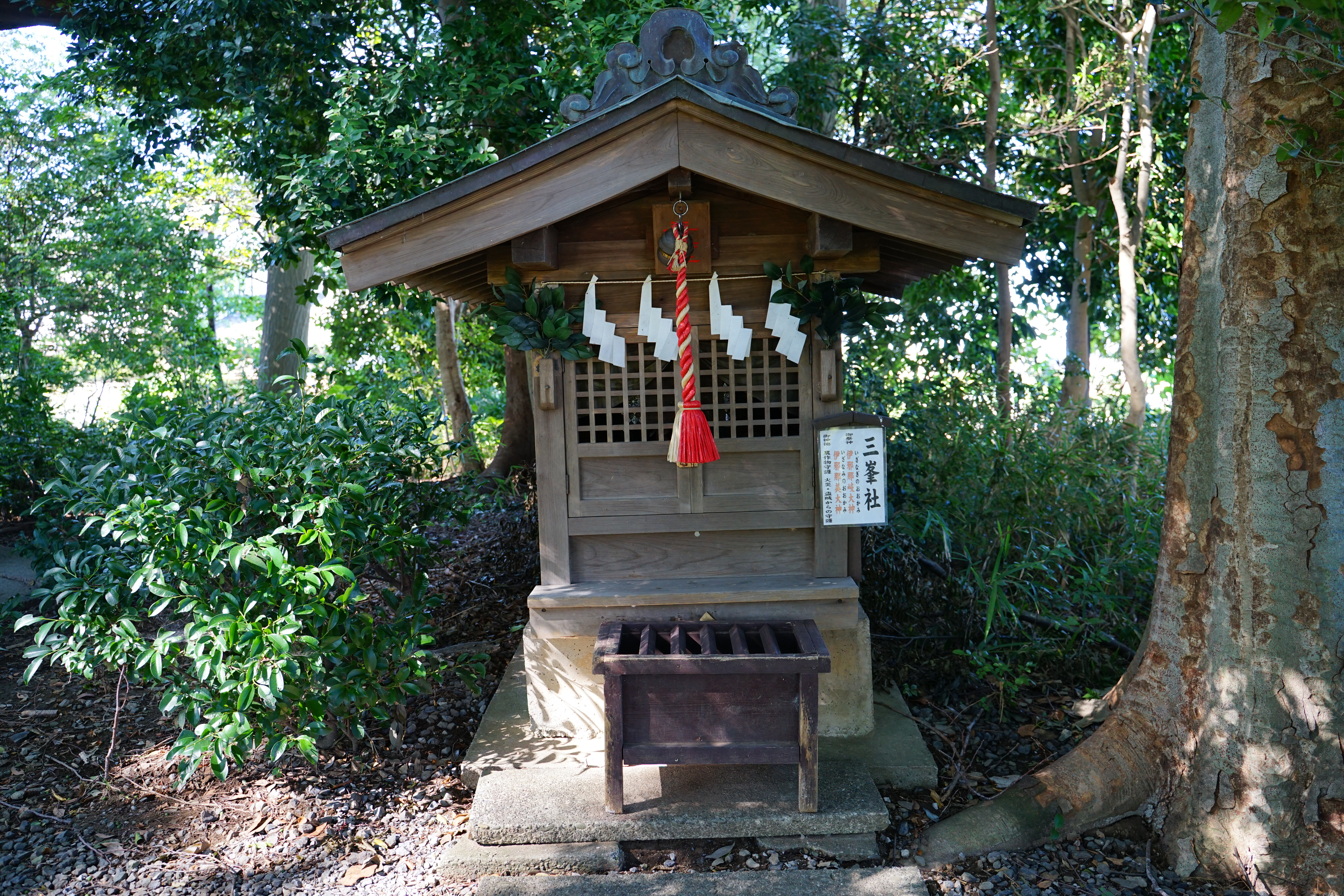 姫宮神社（宮代町）境内社の三峰社